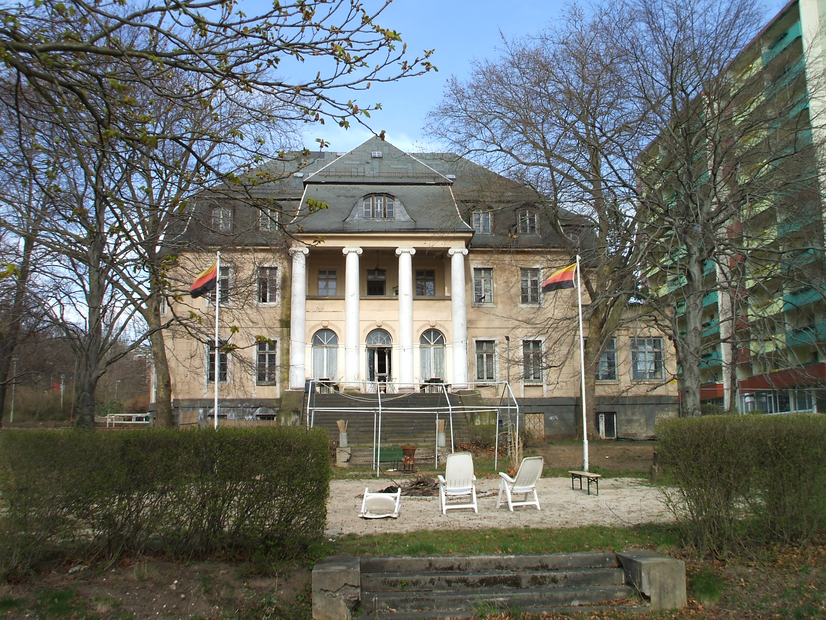 Villa Bardzki, Gera, Germany